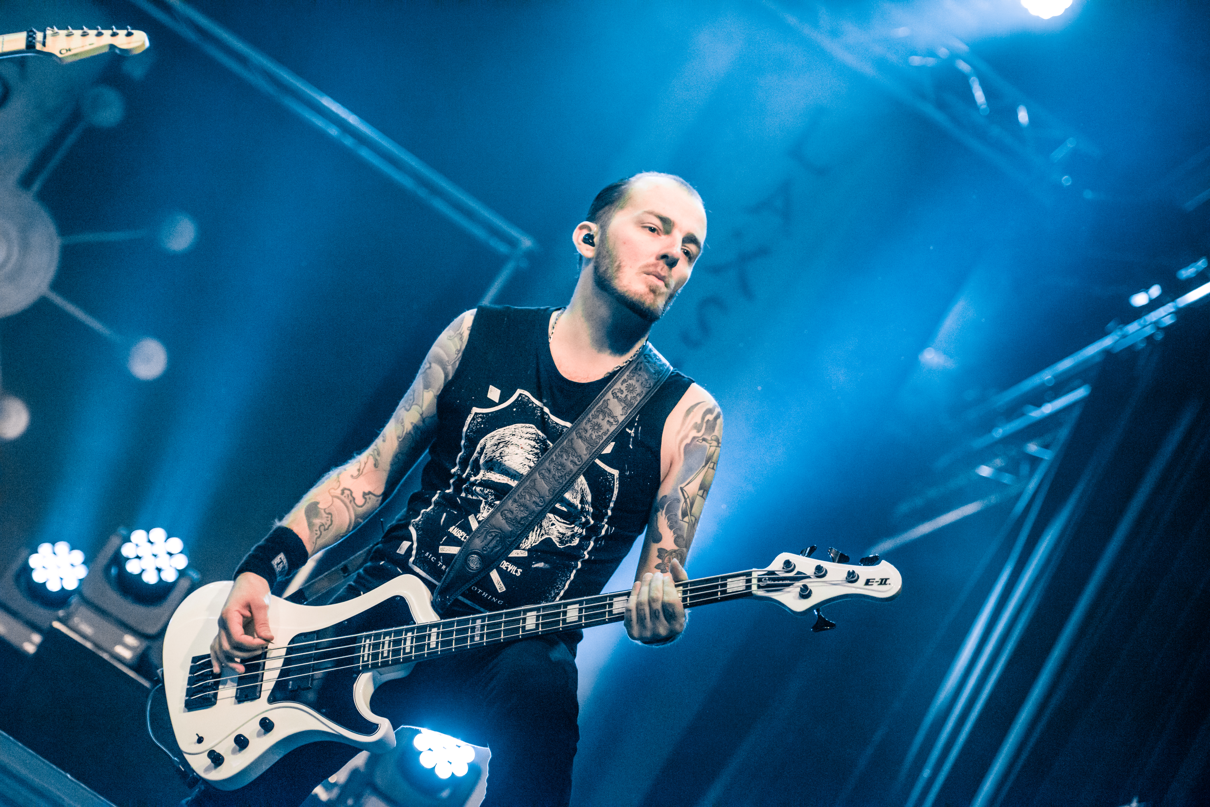 'Eluveitie - Epic Metal Fest - Eindhoven'